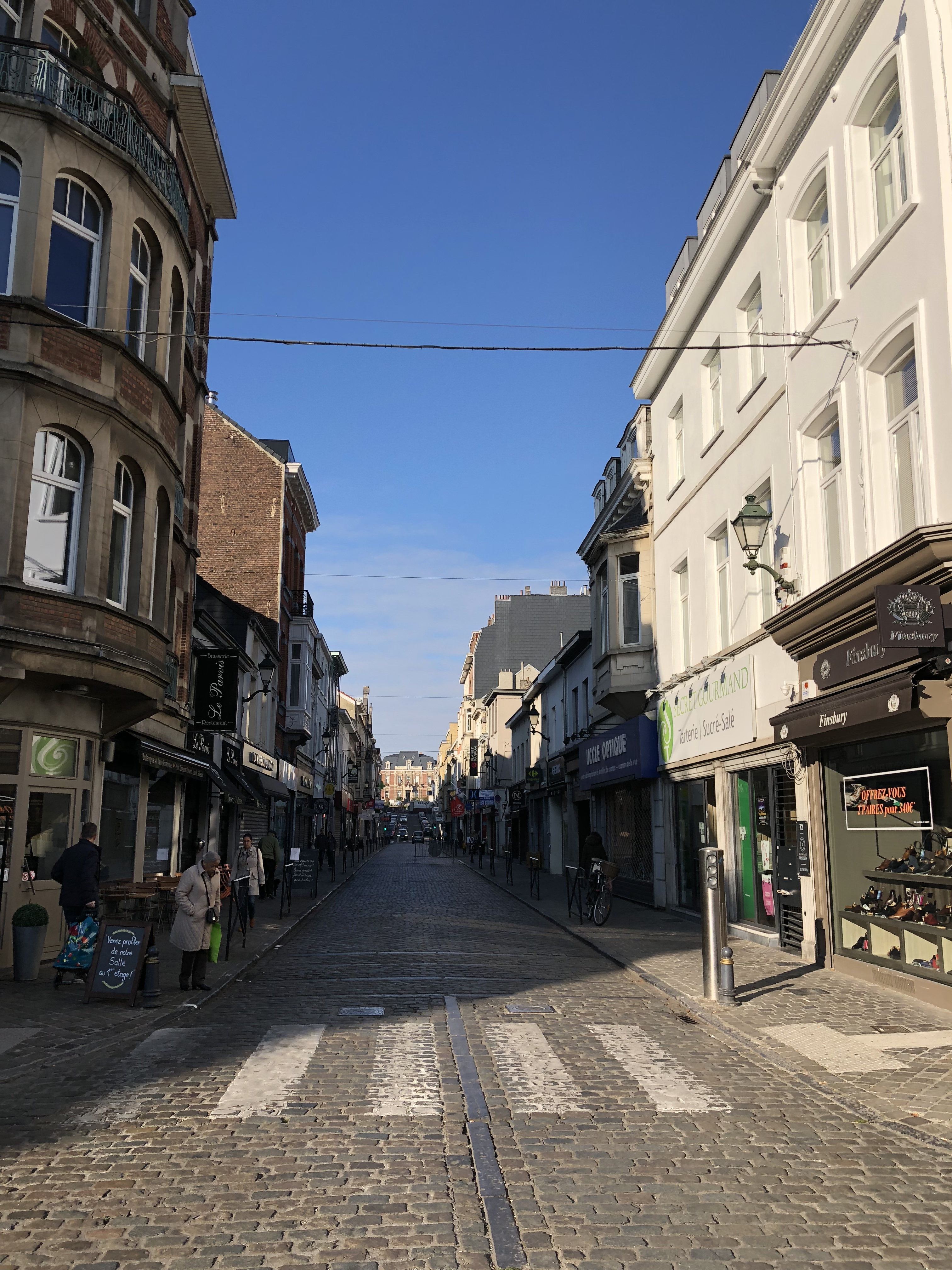 Rue Xavier De Bue